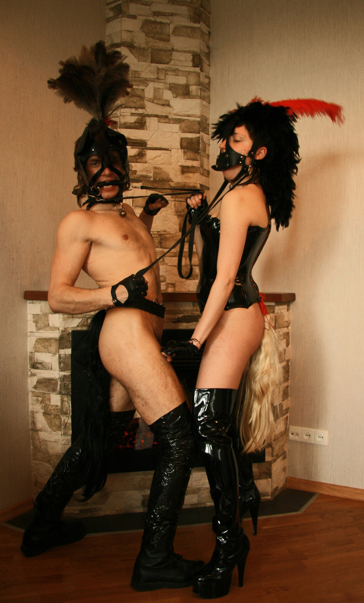 Ponyboy и ponygirl. Фотография создана командой Deviant Creative Team.